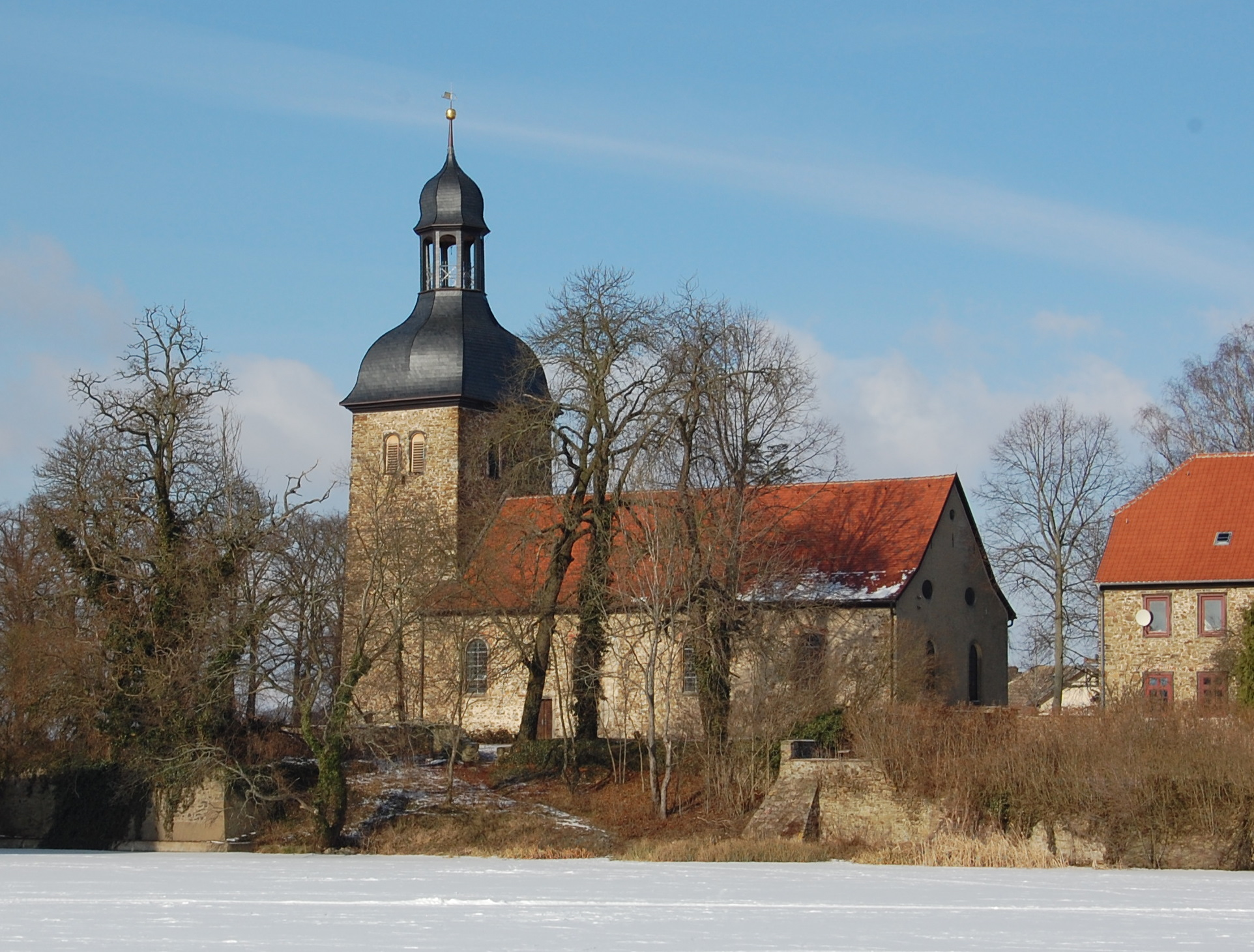 Kirche in Flechtingen, Winter, Blick vom See